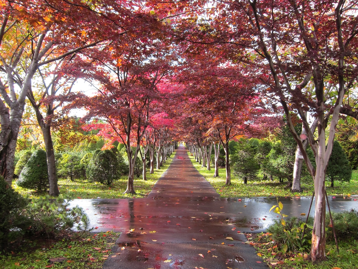 平岡樹芸センターのモミジ並木